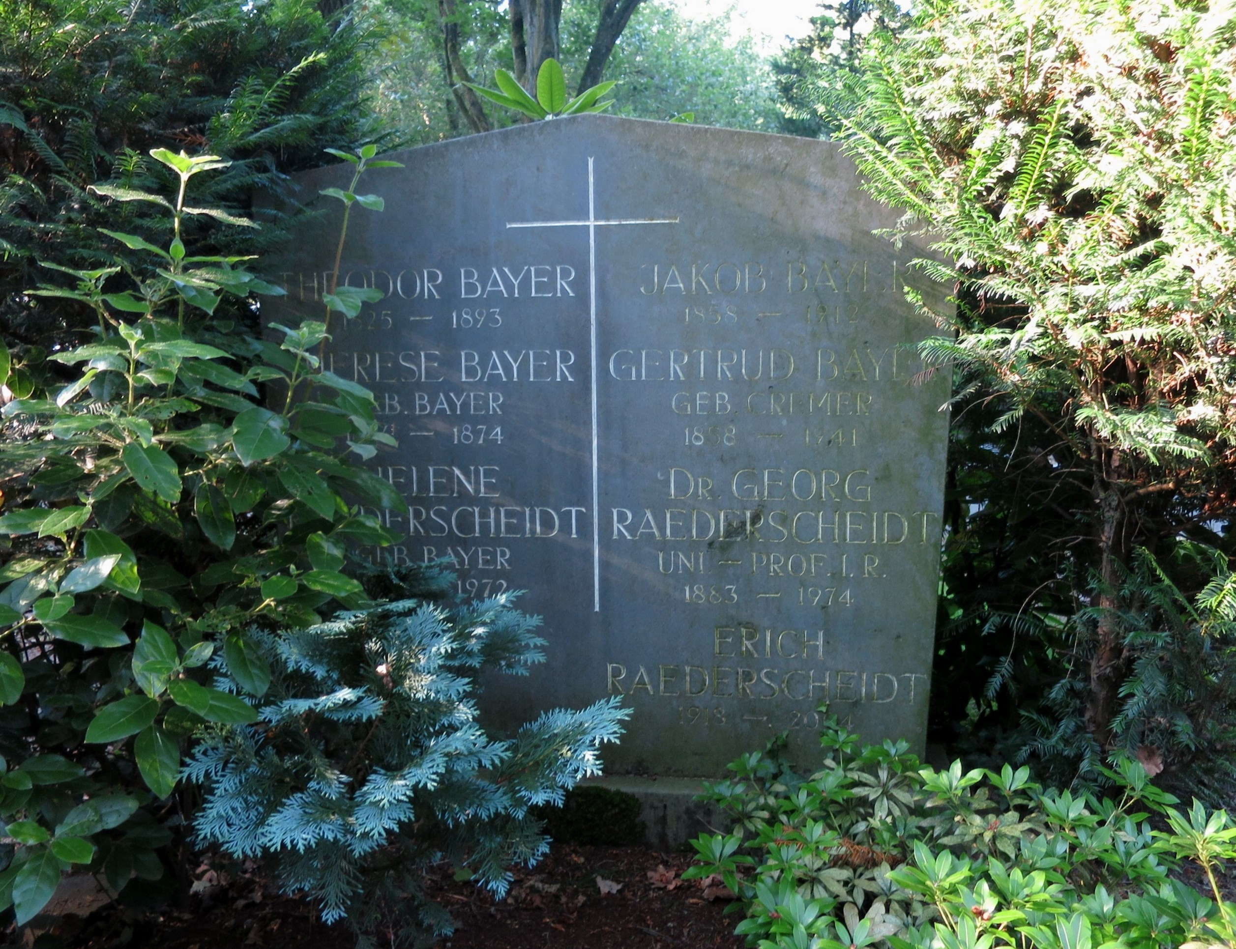 Georg Raederscheidt - Grab auf dem Kölner Friedhof Melaten